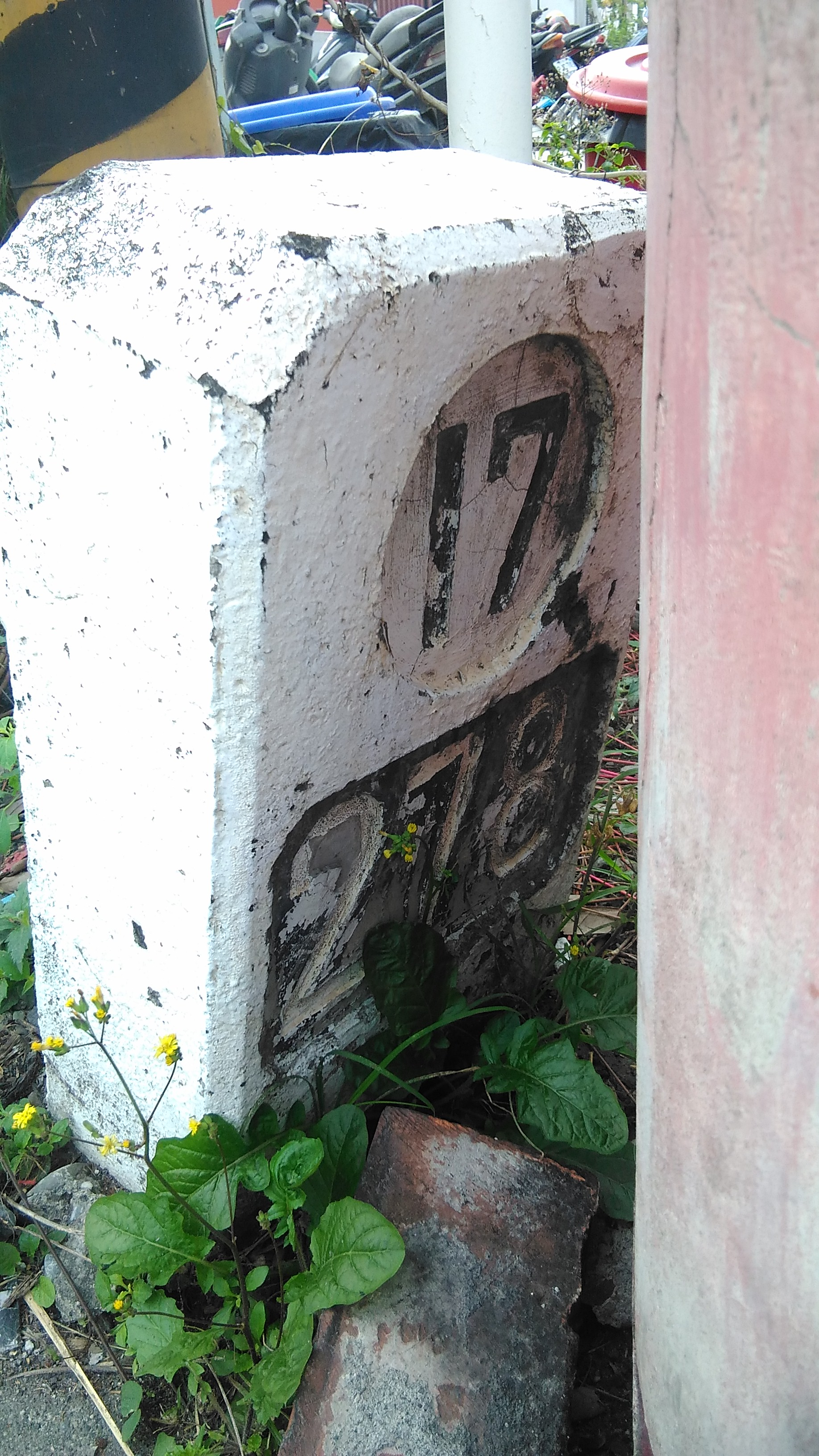 臺灣省道17號（臺17線）的272k里程碑